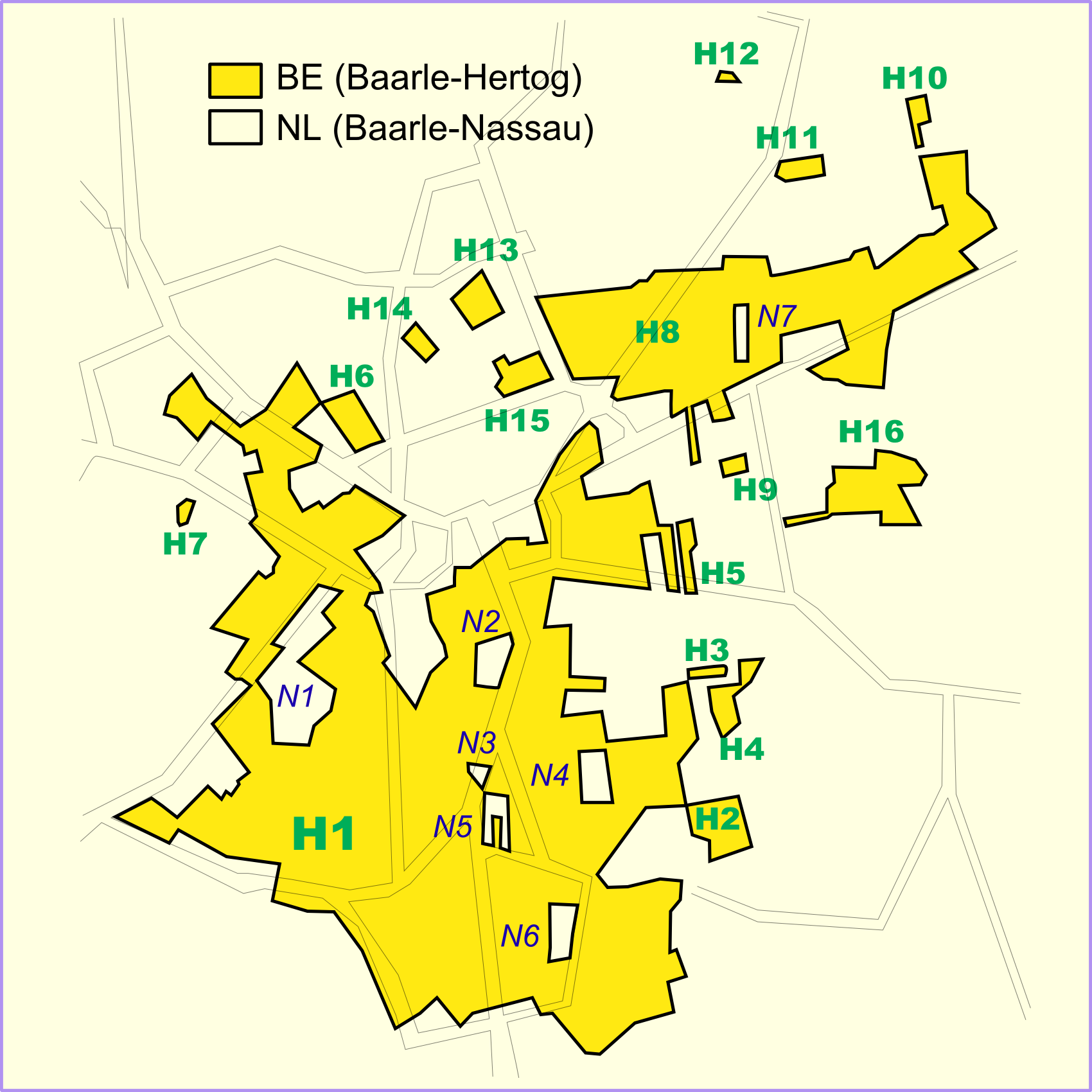 Border between Belgium and the Netherlands at Baarle Nassau & Baarle Hertog